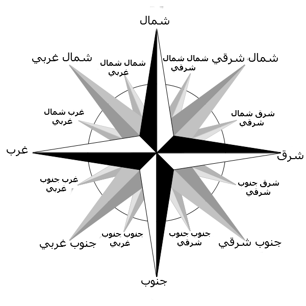 الاتجاهات السماوية باللغة العربية